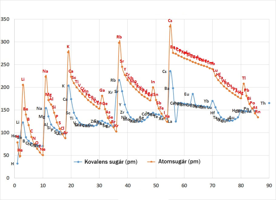 Kovalens és atomsugár összehasonlítása